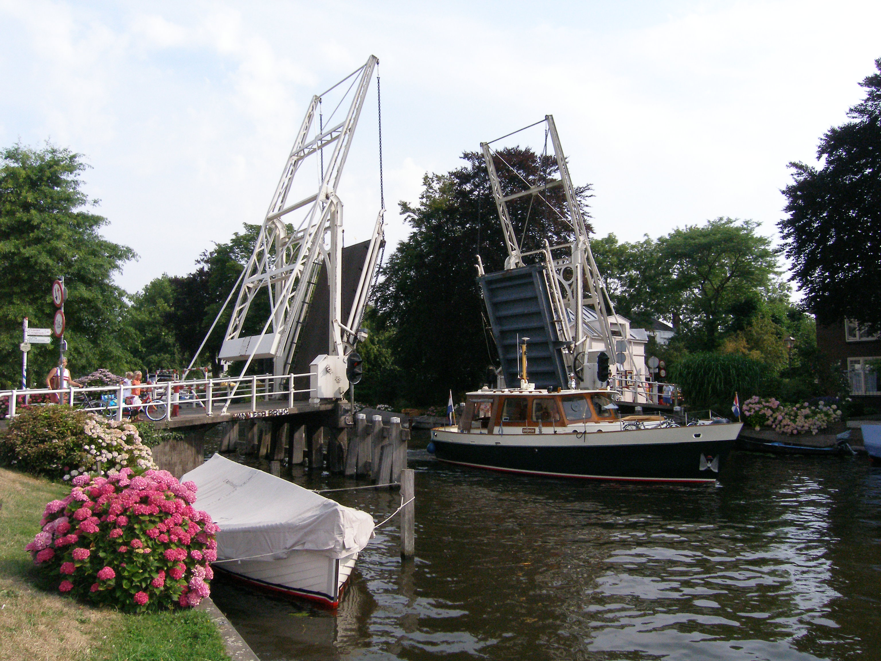 Van Leer Brug, a drawbridge in Vreeland